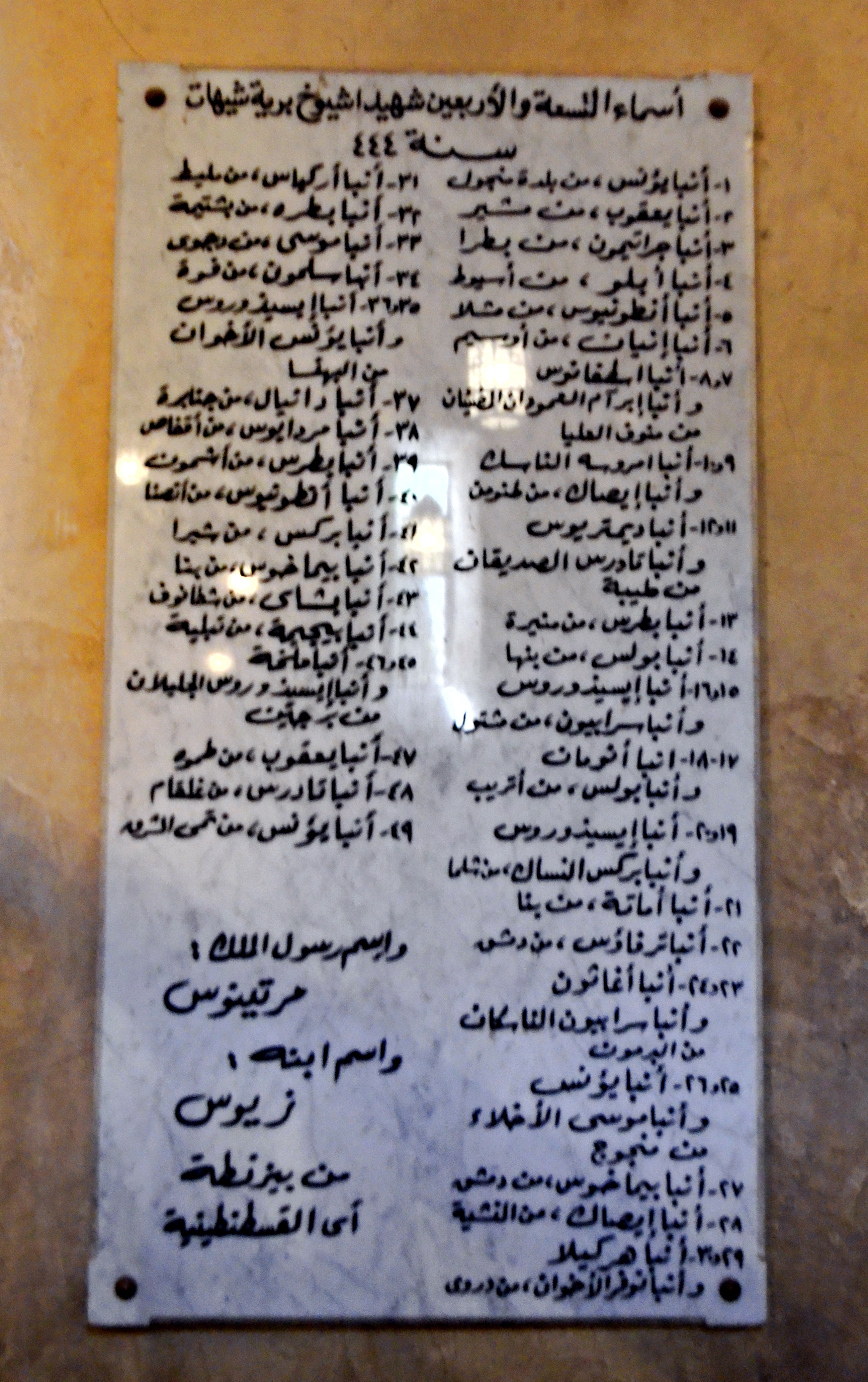 دير القديس الأنبا مقار الكبير، وادي النطرون، محافظة البحيرة، مصر